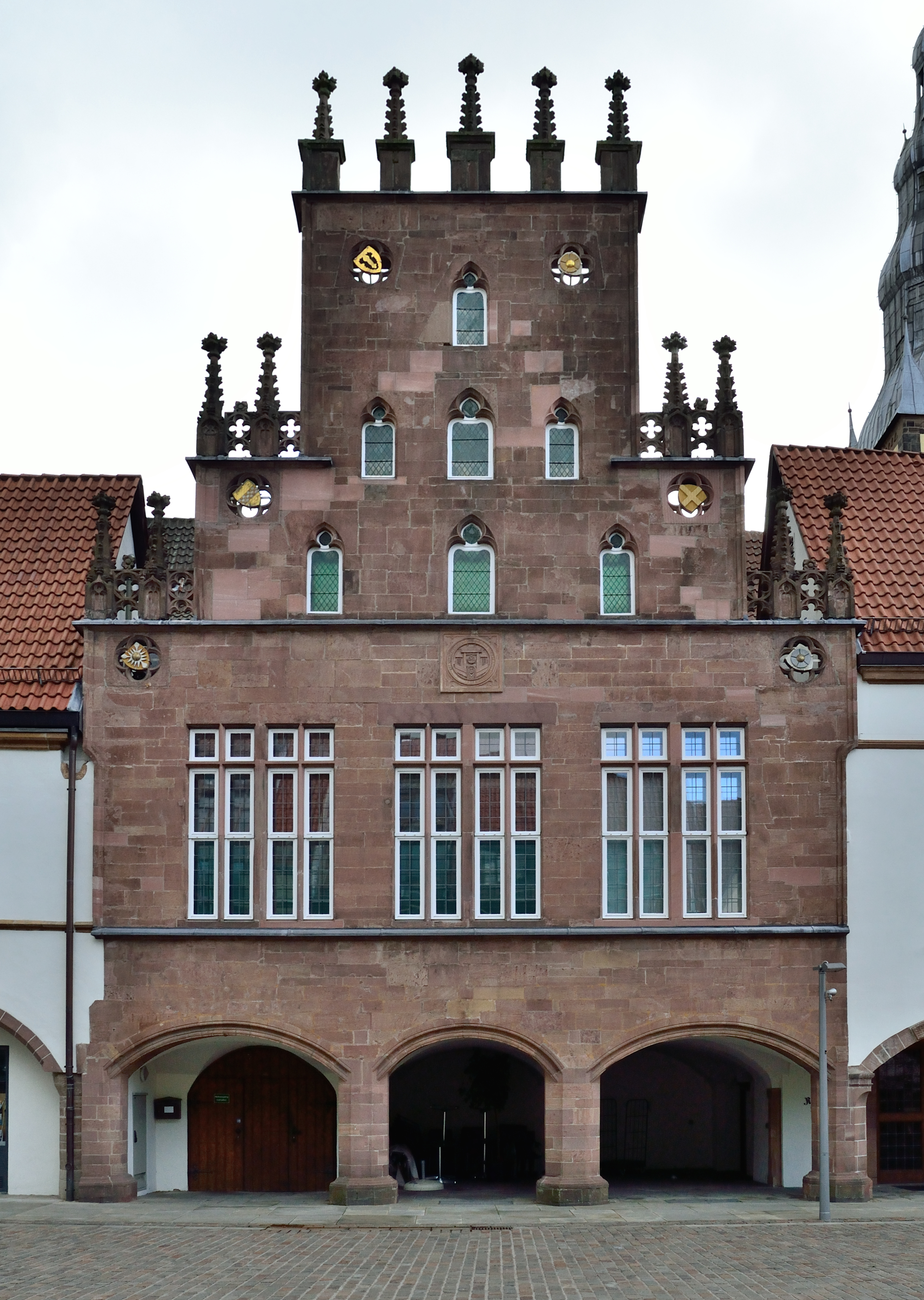 This is a photograph of an architectural monument.It is on the list of cultural monuments of Lemgo Rathaus Lemgo, Ratkammergiebel